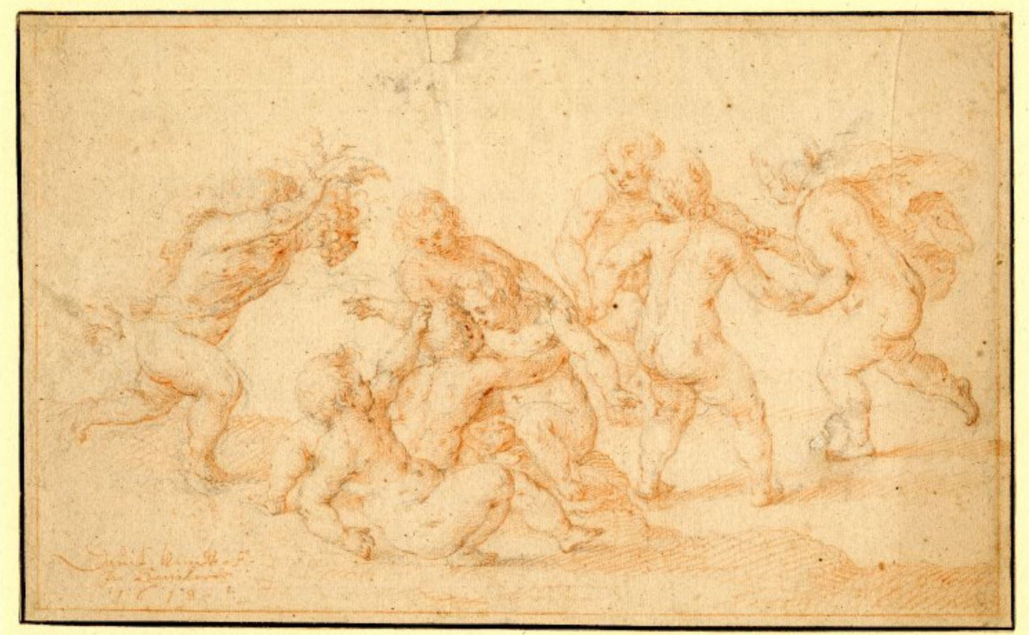 David Kindt: Gruppe von acht nackt spielenden Kindern, Graphit und Kreide auf Papier, 27,5 × 17 cm. 1619 – British Museum, London